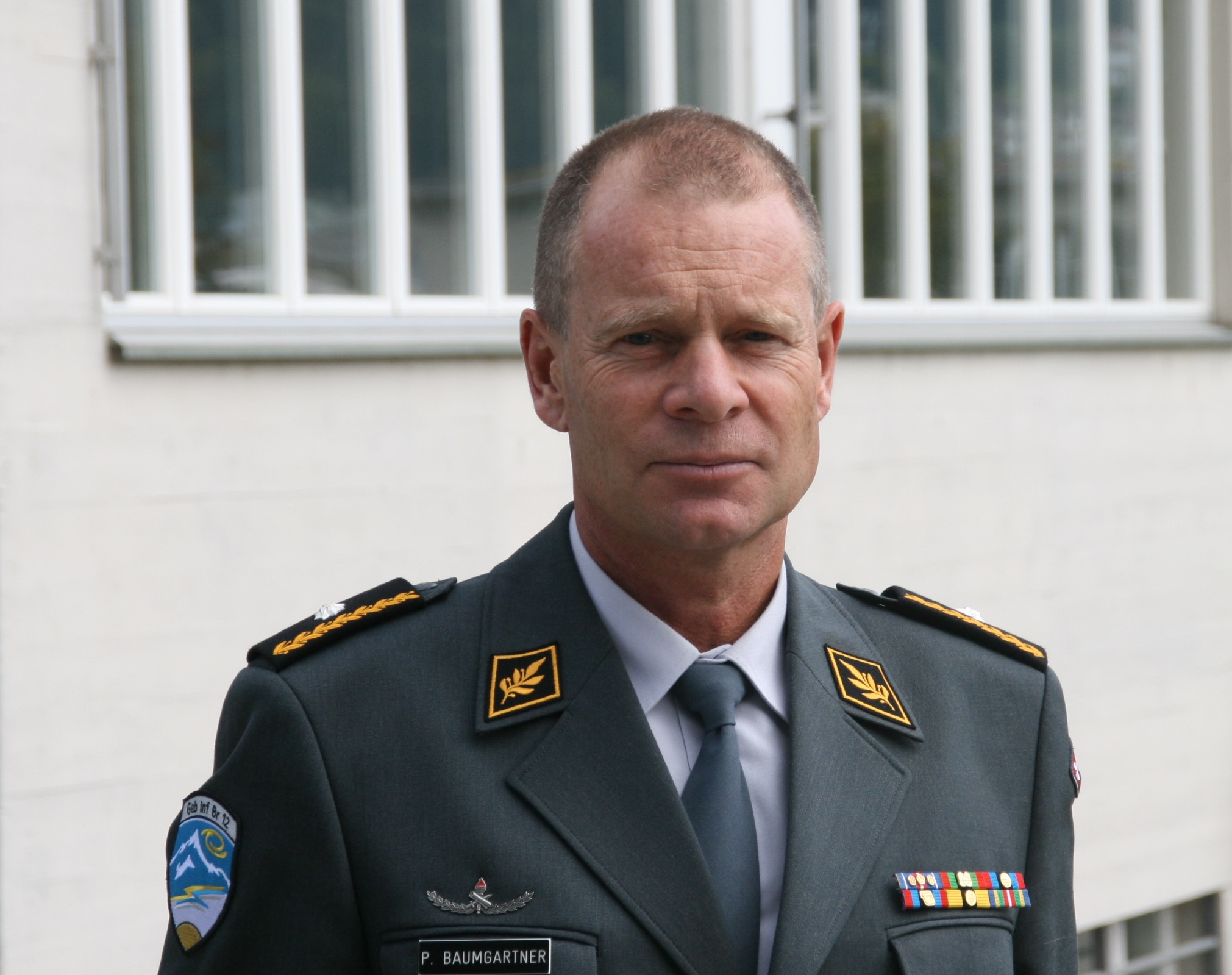 Br Peter Baumgartner während der SOGART Herbsttage 2017